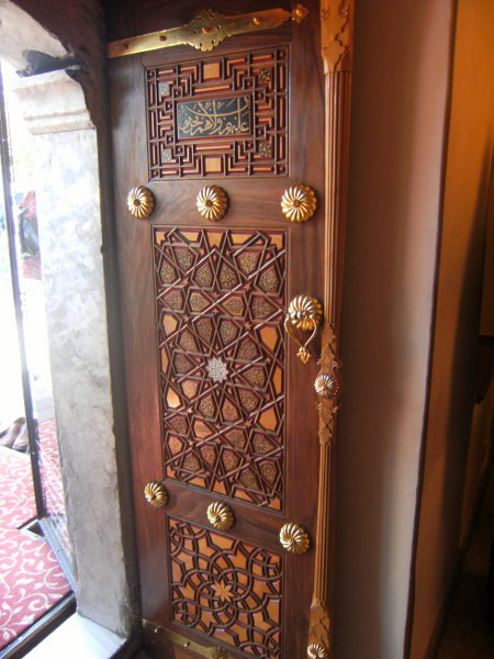 Hacı Bayram Türbesi kapısı